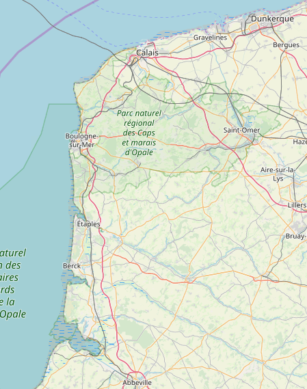 Karte, die die Opalküste zeigt zw. Sommemündung u. Franz.-Flandern